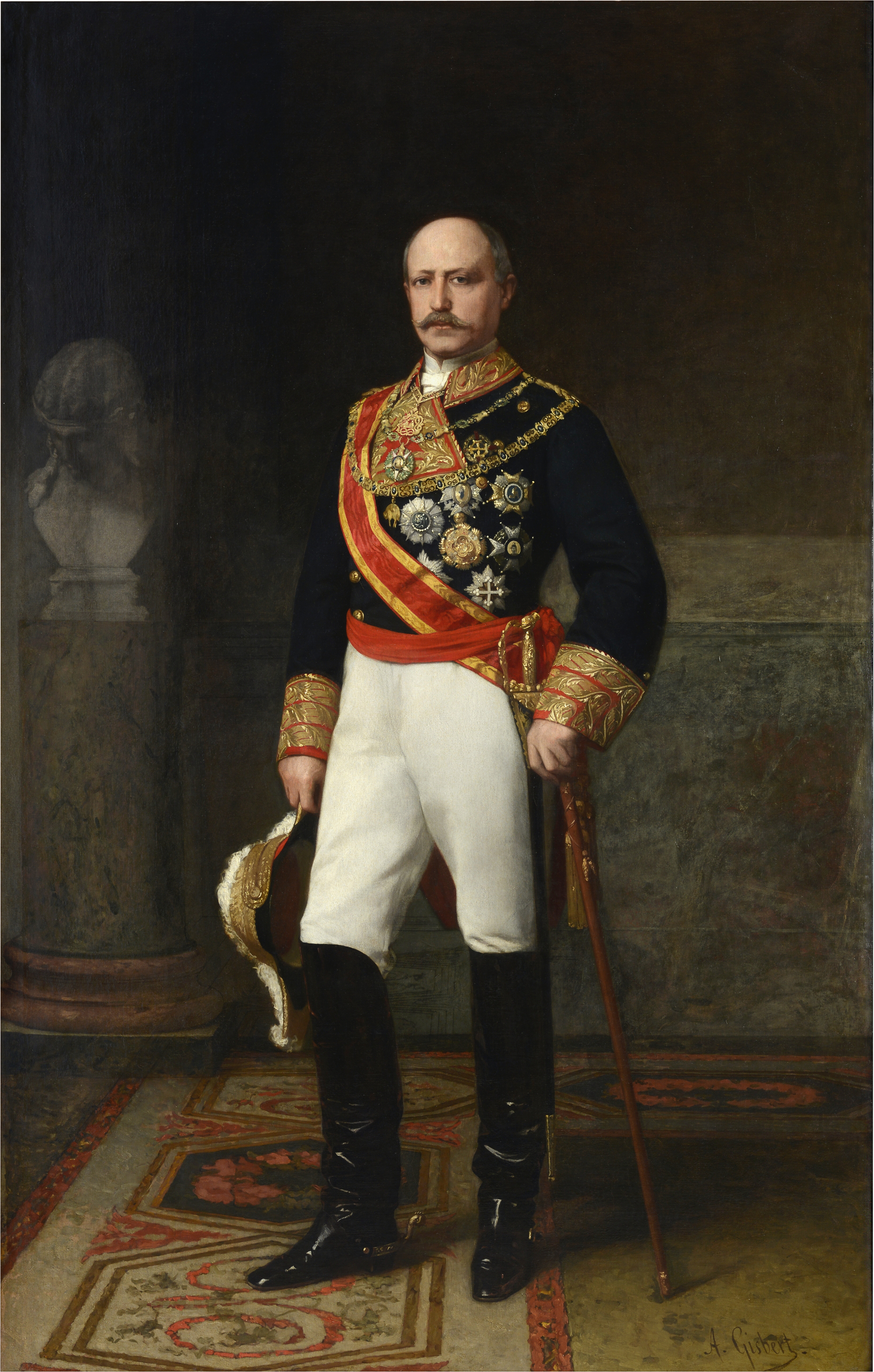 Retrato del general español Francisco Serrano y Domínguez (1810-1885), primer duque de la Torre y capitán general del ejército español.